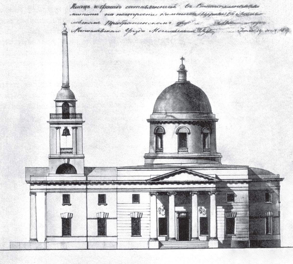 Беларуская (тарашкевіца): Мазалава (Mazałava). Царква, праект